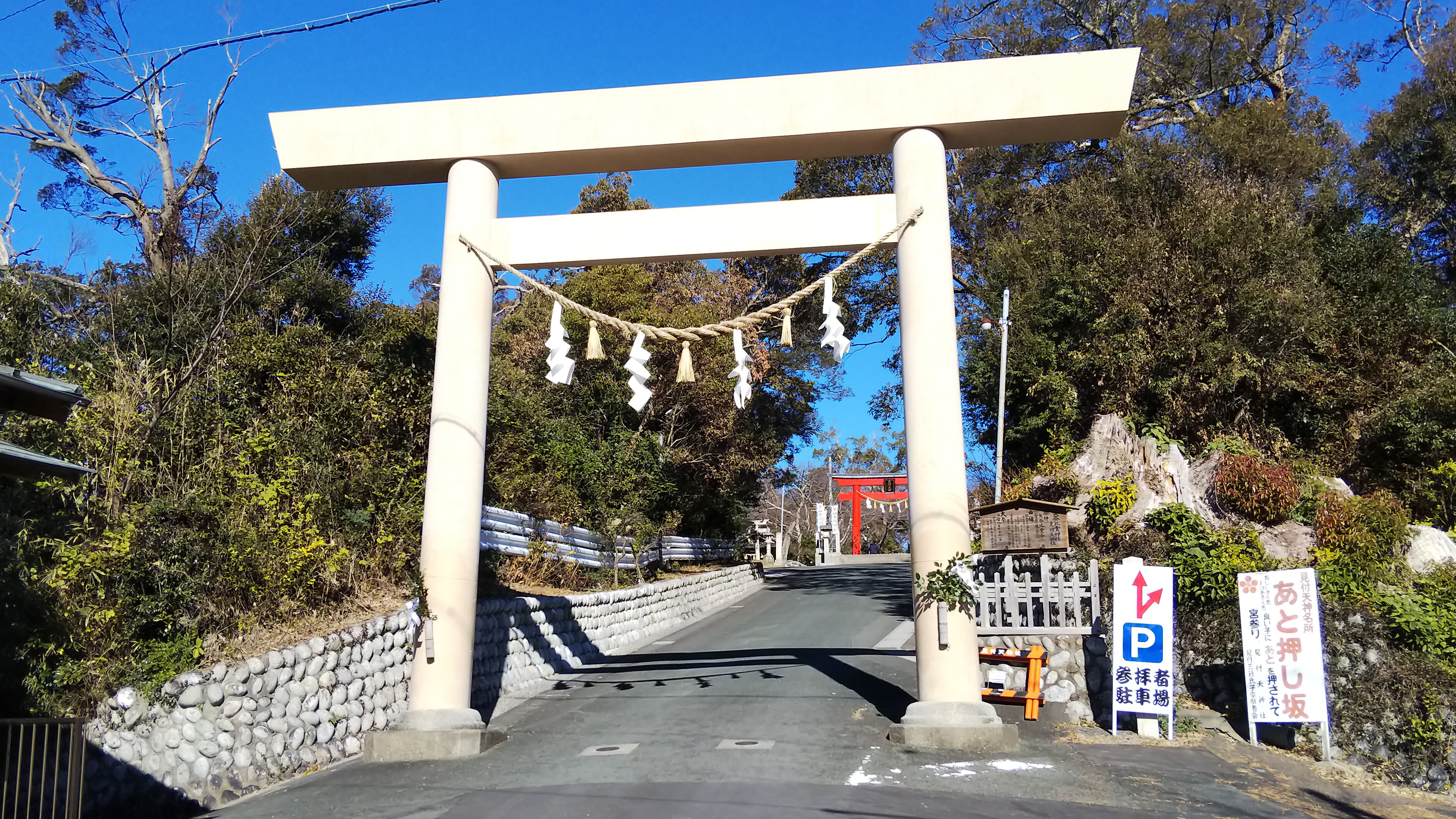 矢奈比売神社一の鳥居